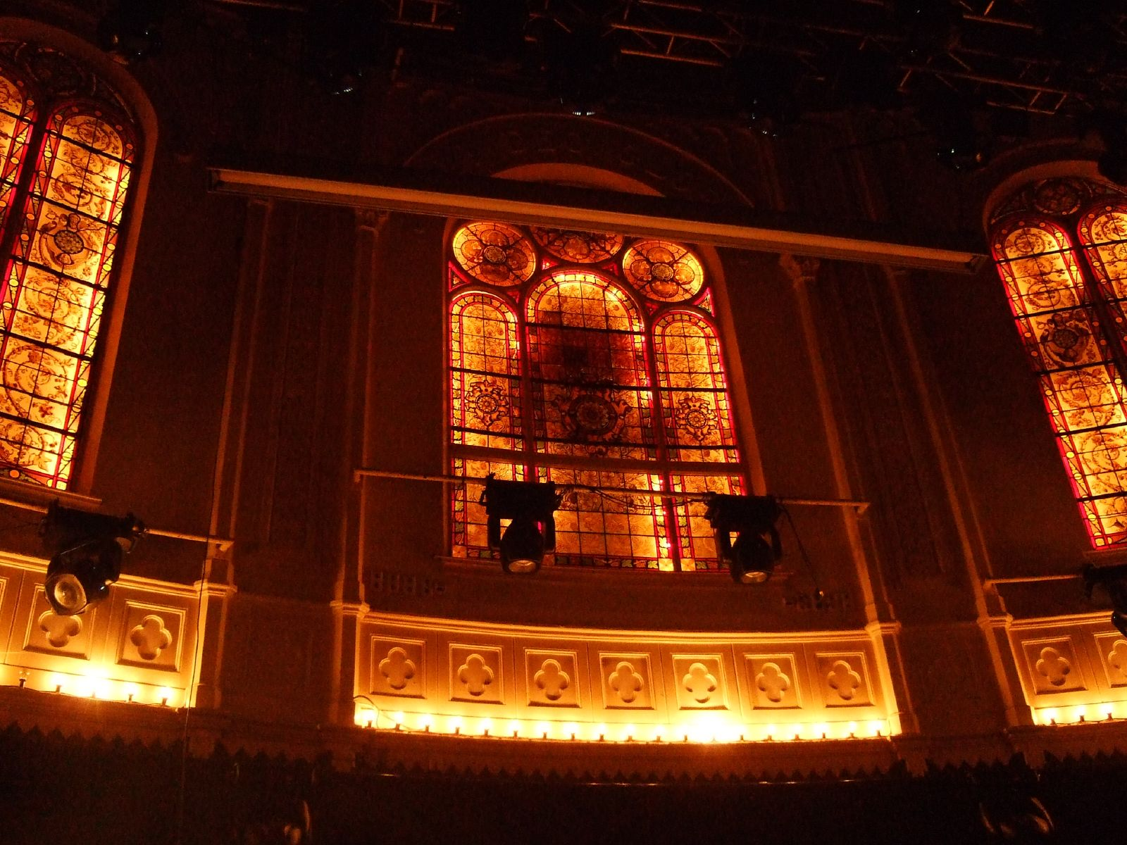 Gebrandschilderde ramen van Paradiso, Amsterdam